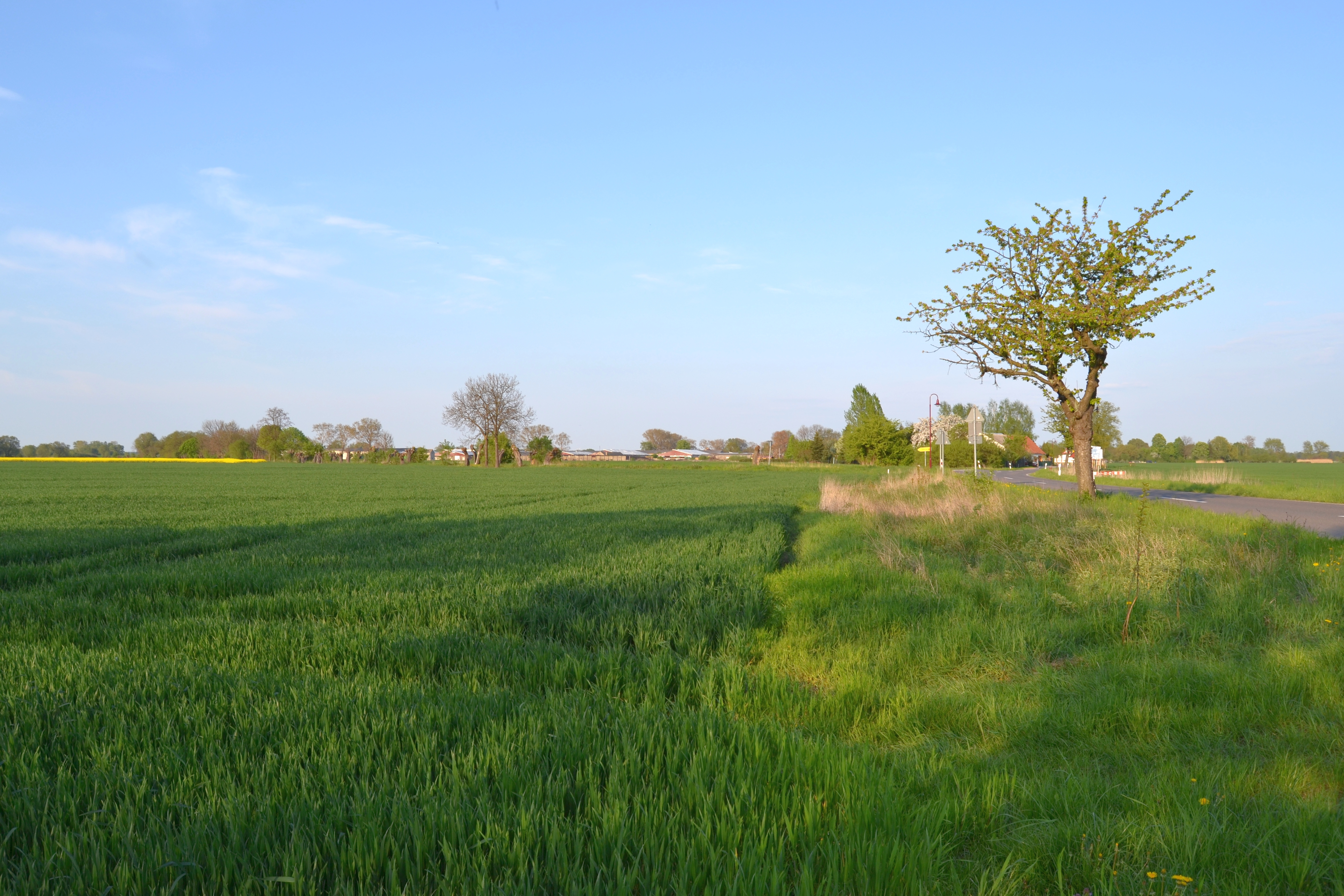 Blick auf Sophienthal, heute zu Letschin.